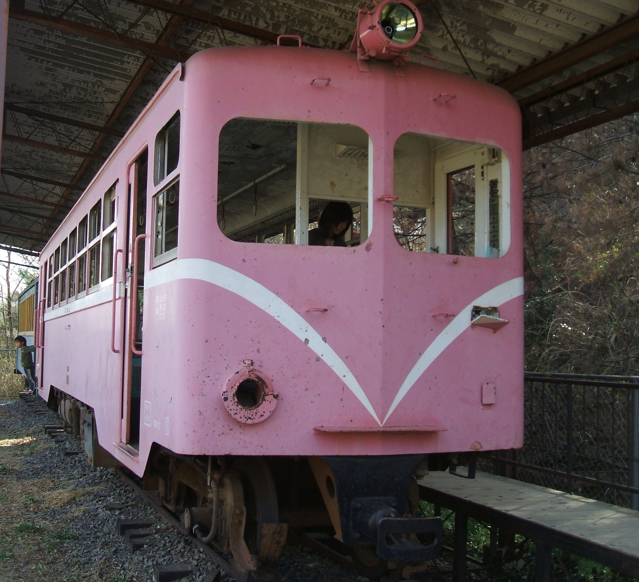 岡山県で運行されていた井笠鉄道のホジ101型気動車。現在、井原市笹賀町の経ヶ丸グリーンパークで展示保存